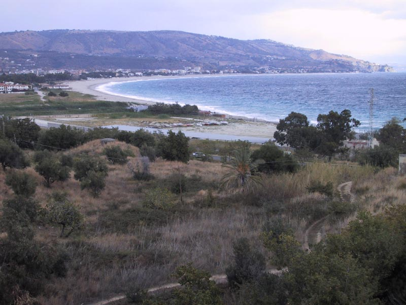 Il tratto di costa ionica compreso tra Soverato e Montepaone